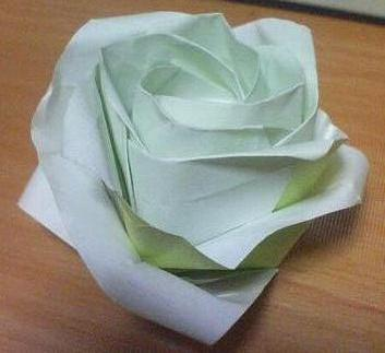 rose blanche en origami utiliser notanment par Konan de l'Akatsuki